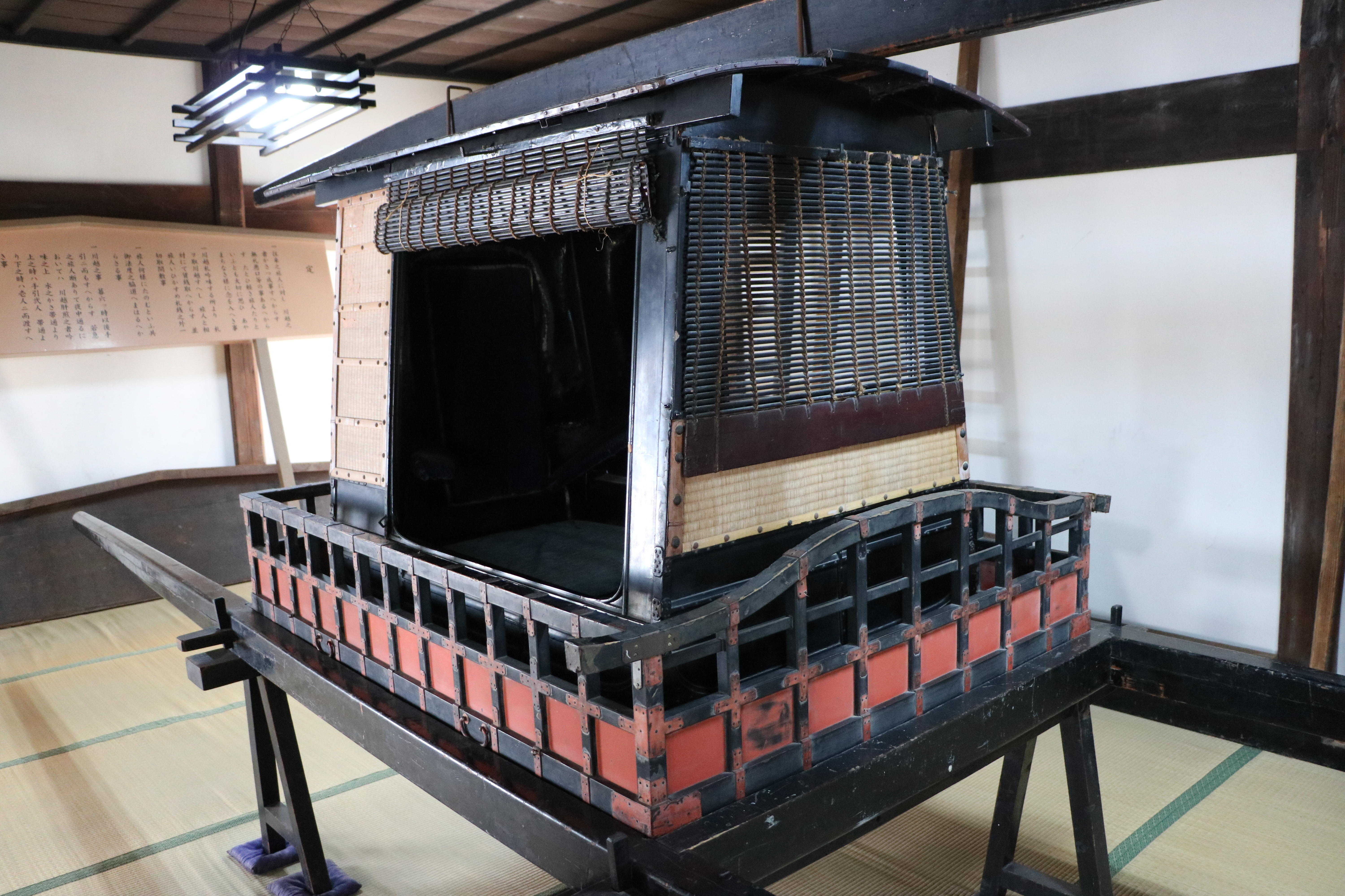 島田宿大井川川越遺跡。川会所の大高欄連台。